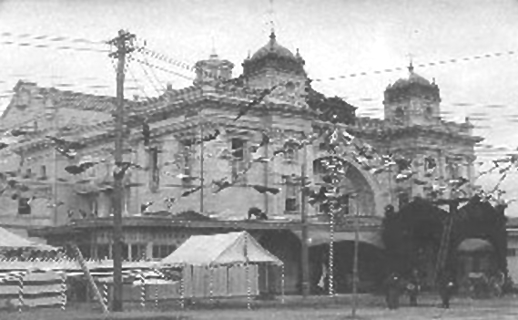 有楽座は、1908年に開場し、1923年に焼失した洋風劇場。